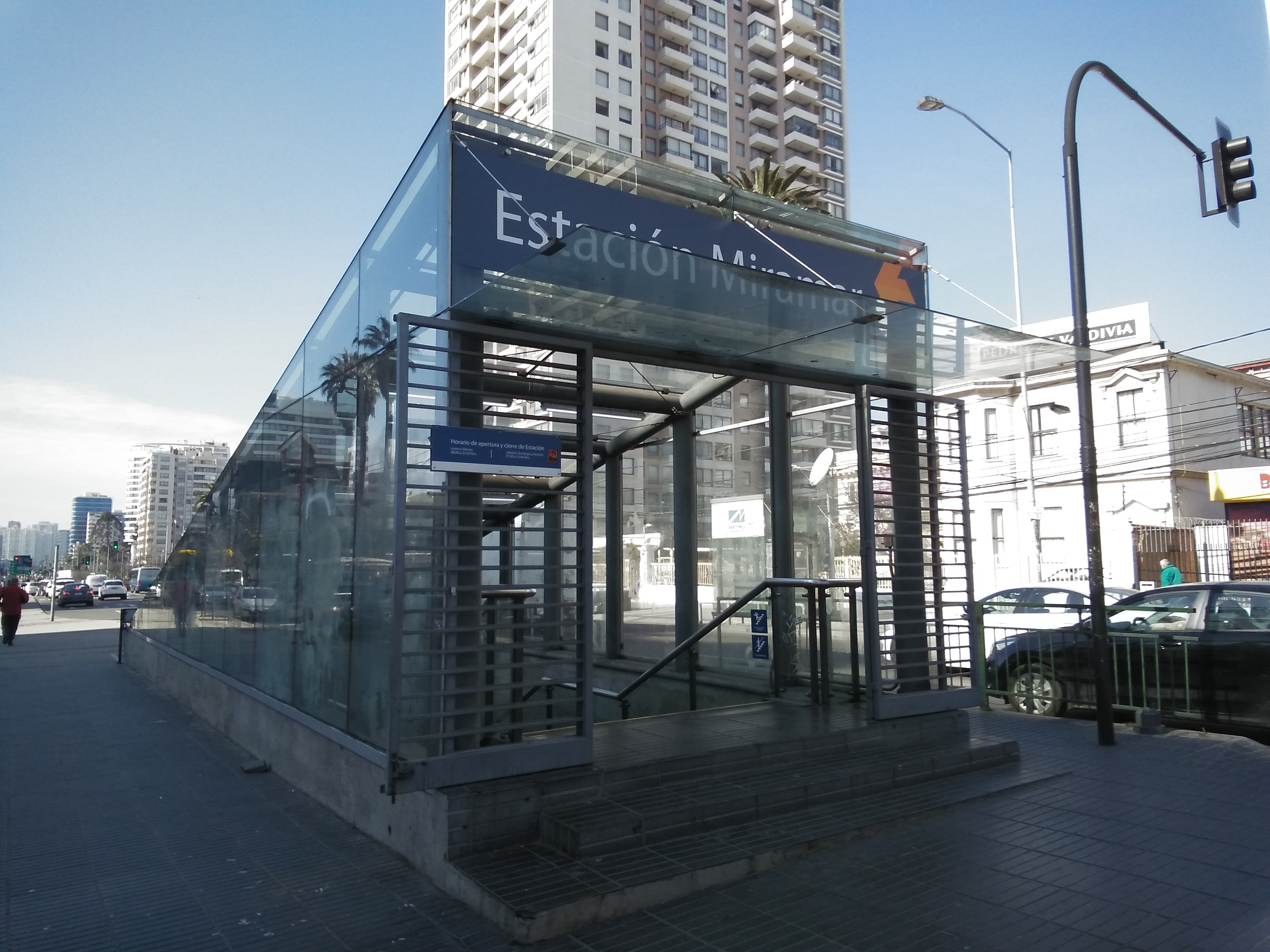 Acceso a la estación Miramar del Metro Valparaíso.